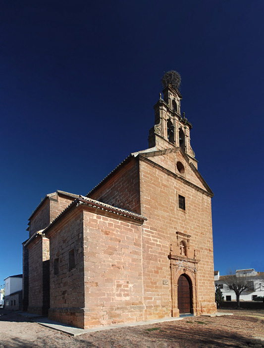 Fotografía de la fachada de la ermita de Jesús del Llano en Baños de la Encina, Jaén